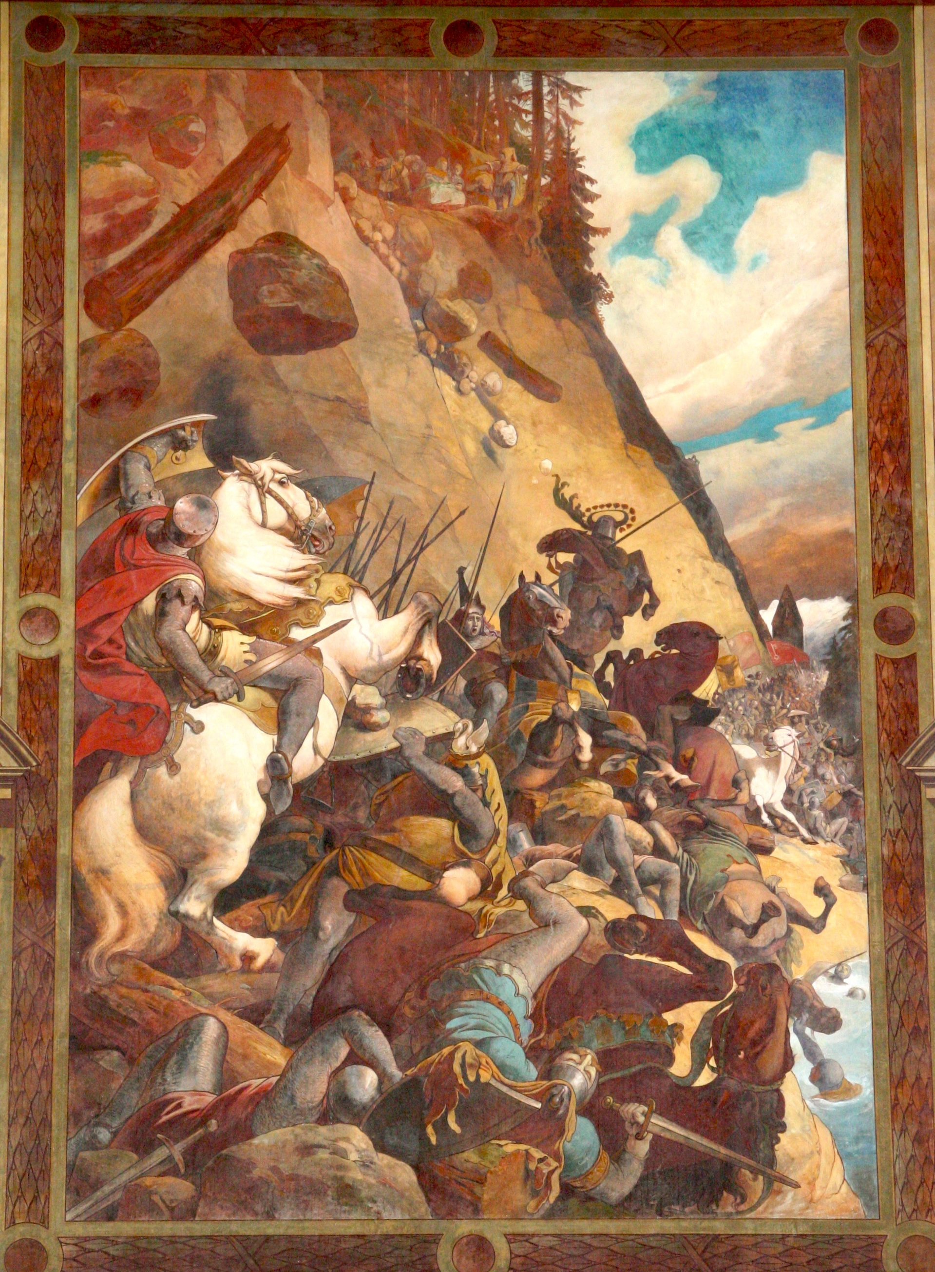 Darstellung der Schlacht am Morgarten am Ratshaus von Schwyz